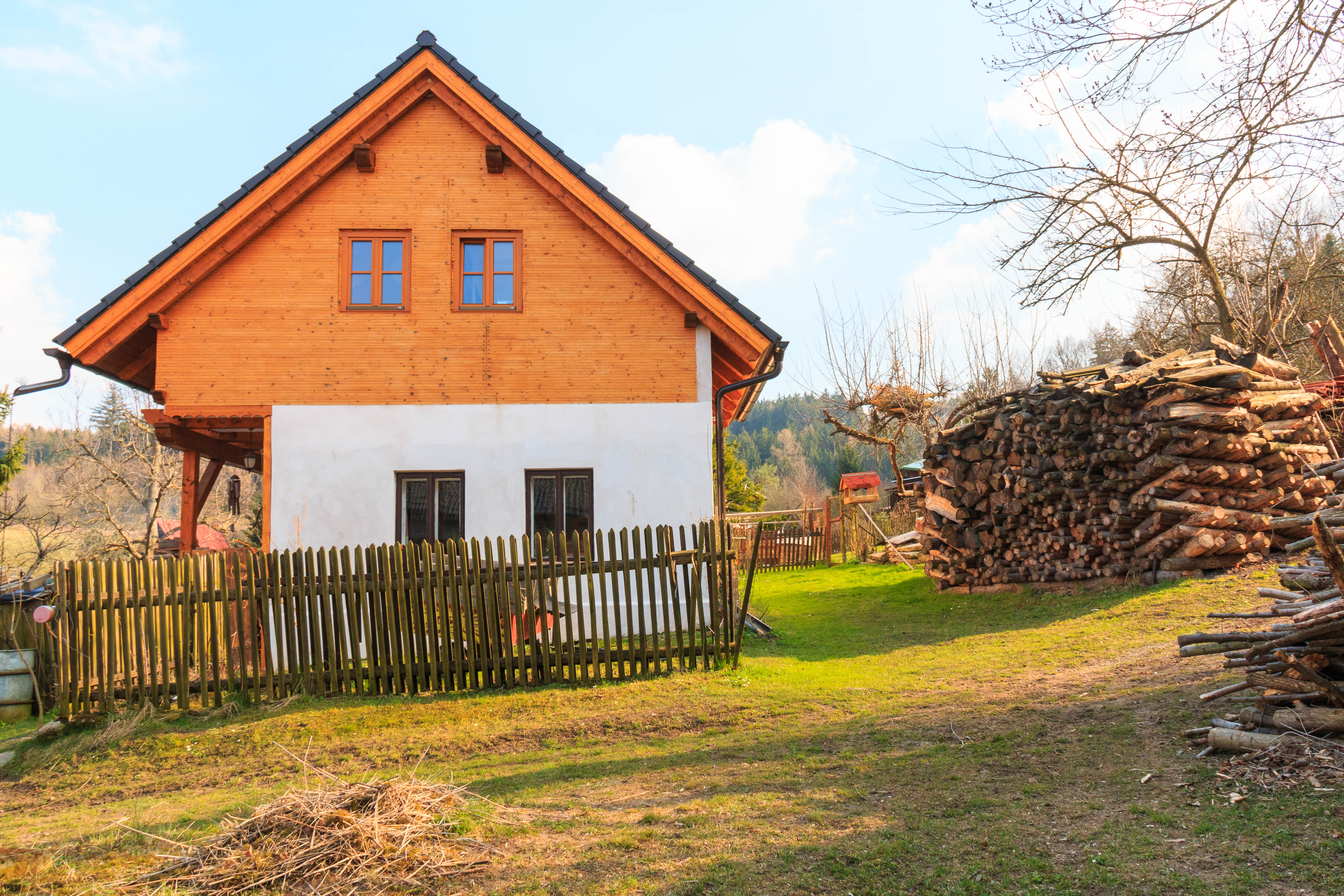 Mezihoří č 11